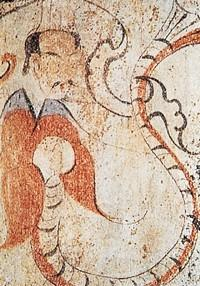 伏羲像（西汉卜千秋墓壁画）